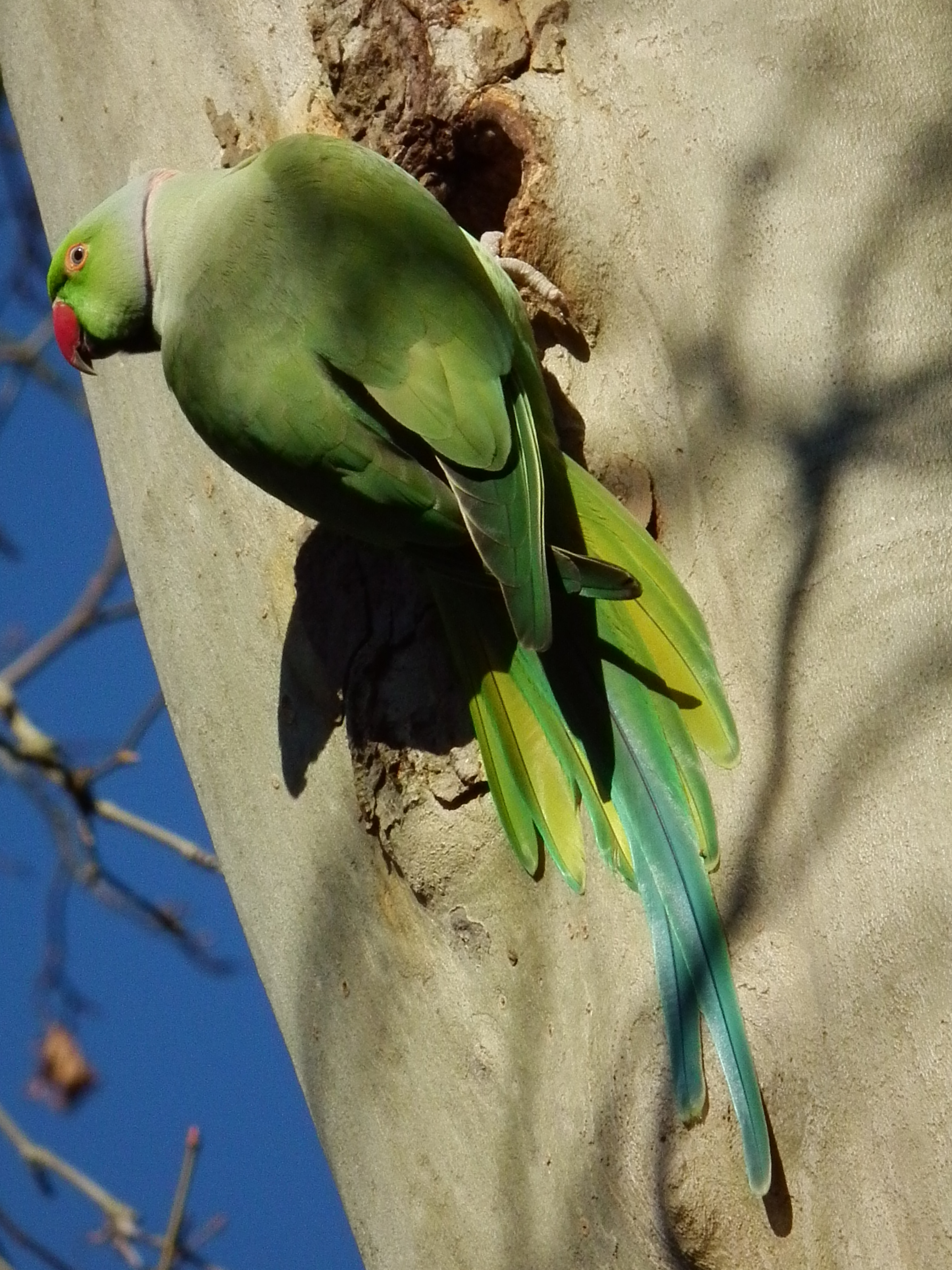 Halsbandsittich (Psittacula krameri) am Eingang zu einer Bruthöhle in einer Platane, fotografiert in Heidelberg (Baden-Württemberg, Deutschland)